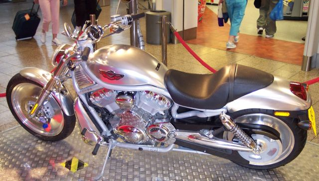 Harley Davidson VRSC, eigenes Bild, GFDL